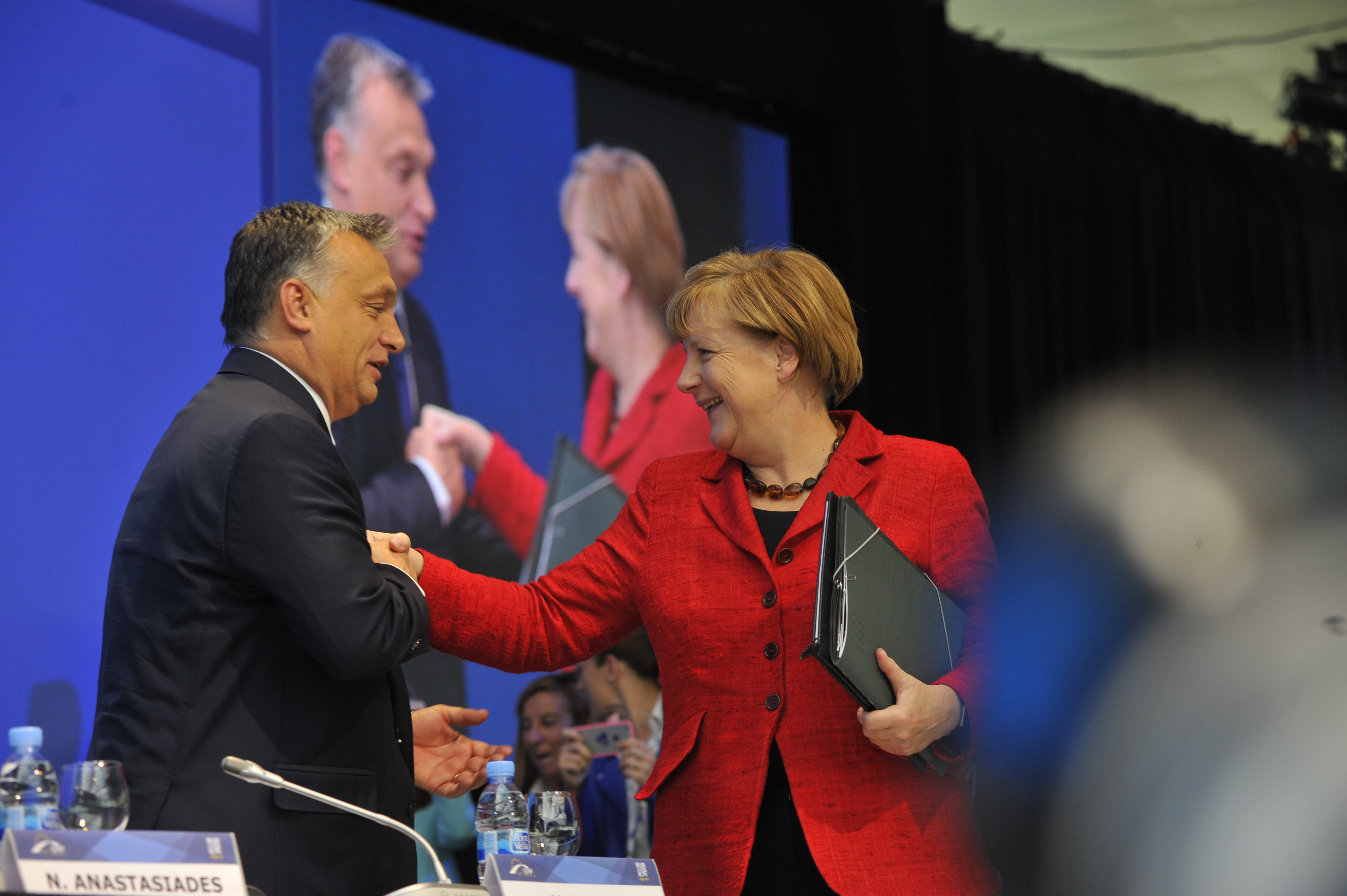 Orbán Viktor, 2015-10-22